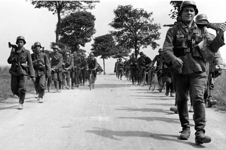 Propk. Kp 612 Archiv-Nr. 30/910 Bildberichter: Bauer Text: Uetrecht Infanterie-zwischen Marsch und Ruhe So marschiert die Infanterie. Jeden Augenblick kampfbereit und auf überraschende Tieffliegerangriffe gefasst